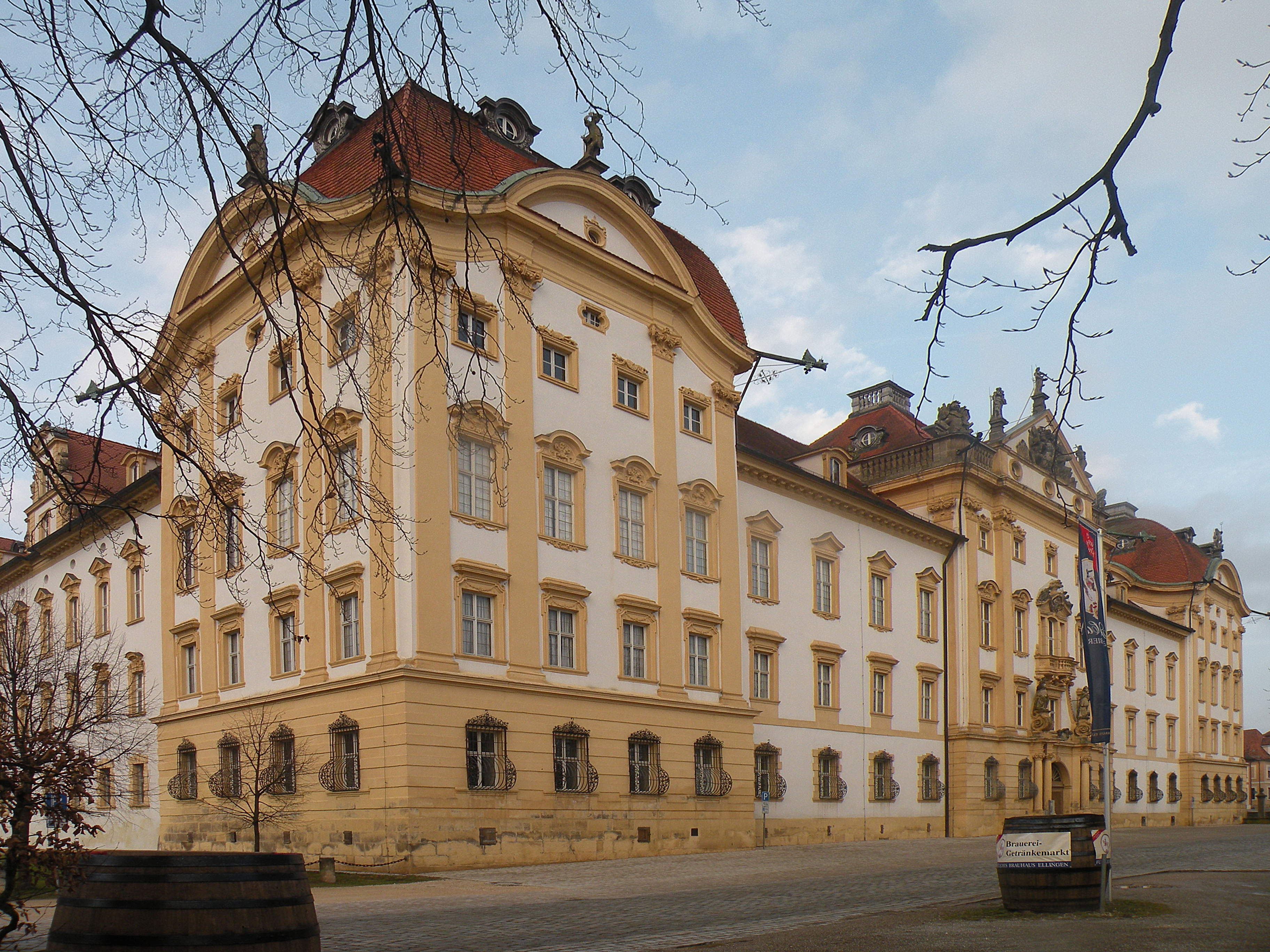 Замок_Немецкого_ордена_в_Эллингене